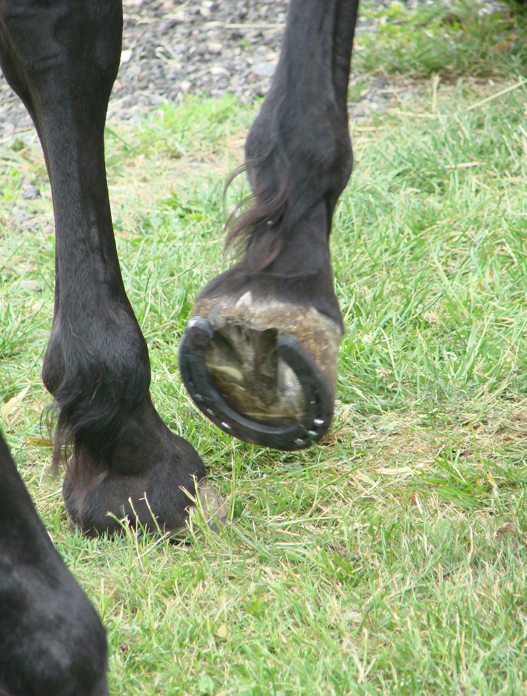 Le fer neuf, alors qu'il ne reste plus que deux clous à poser.